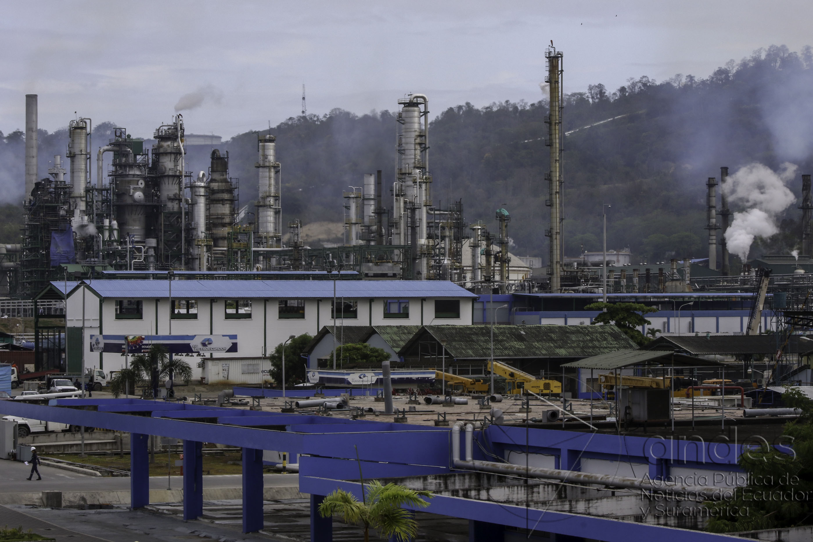 Esmeraldas, 01 dic (Andes).- La refinería de Esmeraldas operará al 100% de capacidad así lo manifestó Alex Bravo Gerente de Petroecuador. ANDES/Micaela Ayala V.